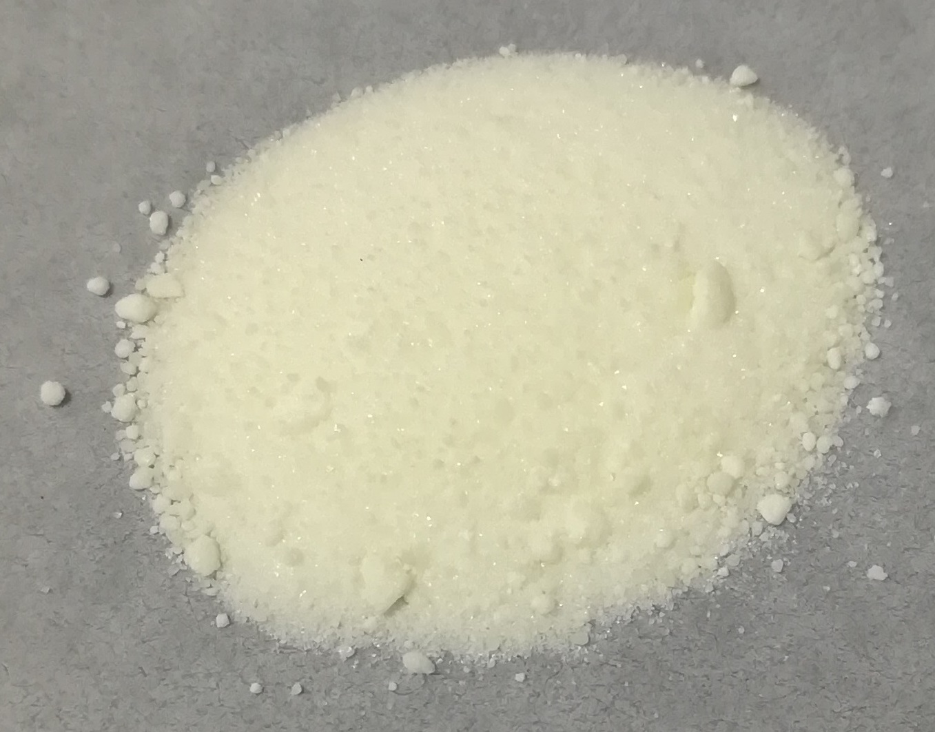 中文（中国大陆）: 乙酸镝(III)样品